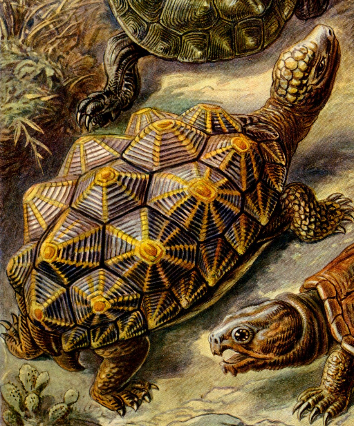 Testudo geometrica (Linné) = Psammobates geometricus (Linnaeus, 1758)